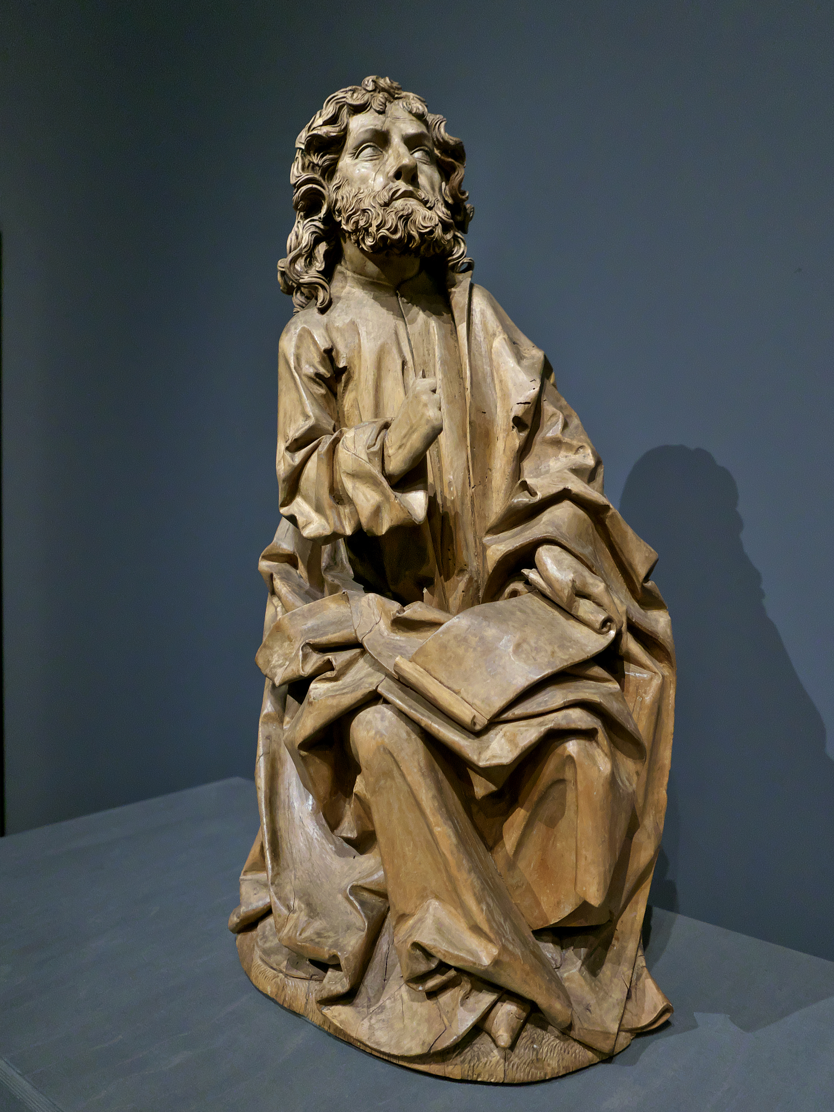 Últimos fuegos góticos, Palacio de Villena (Valladolid). Procedente del Bode Museum, retablo mayor de la Iglesia de St. Maria Magdalena (Münnerstadt), (h. 1490). Tilman Riemenschneider (†1531) madera de tilo. Retablo mayor de la Iglesia de Santa María Magdalena (Münnerstad)